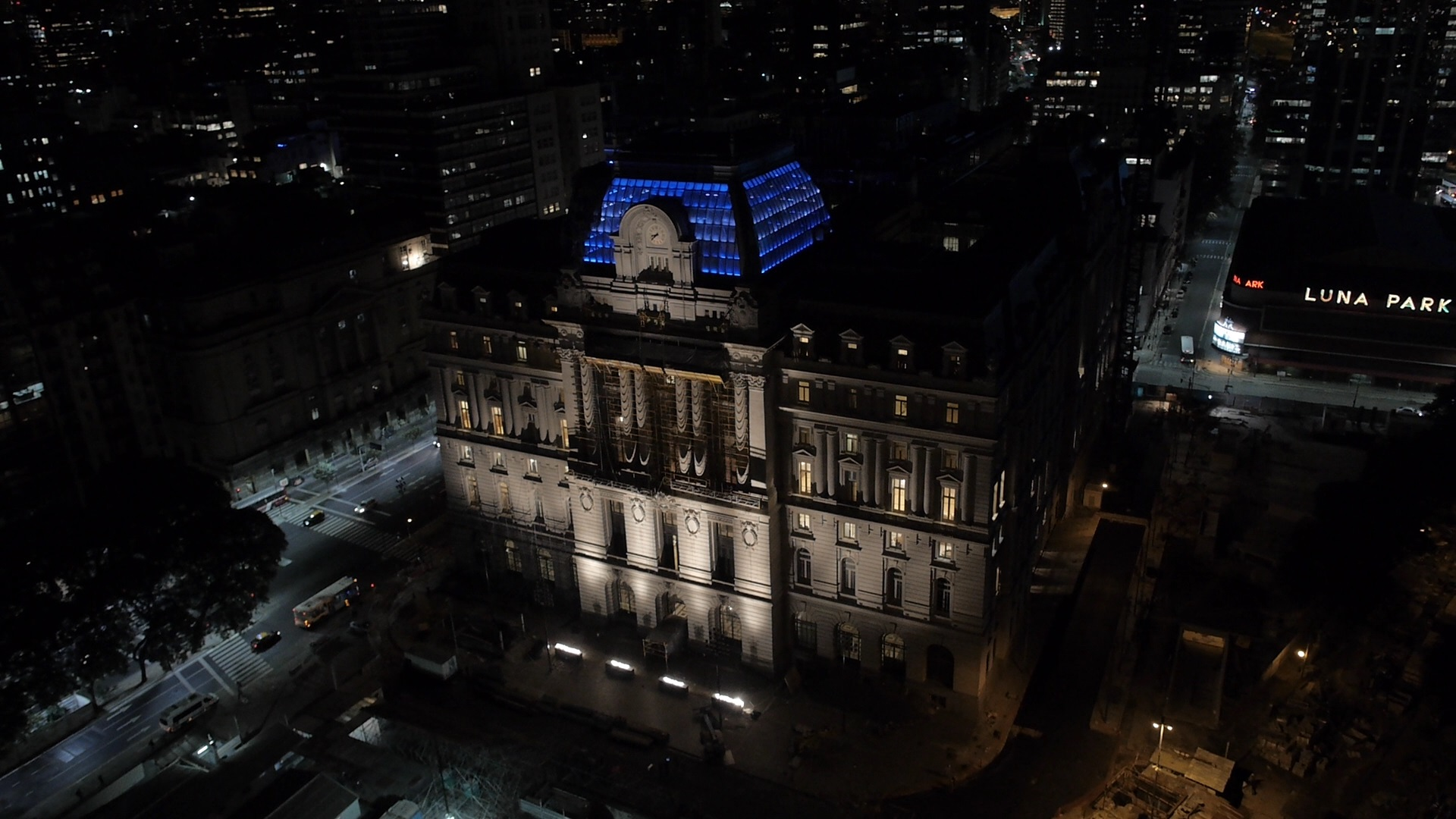 El Correo Central luego de las reformas para convertirlo en Centro Cultural.